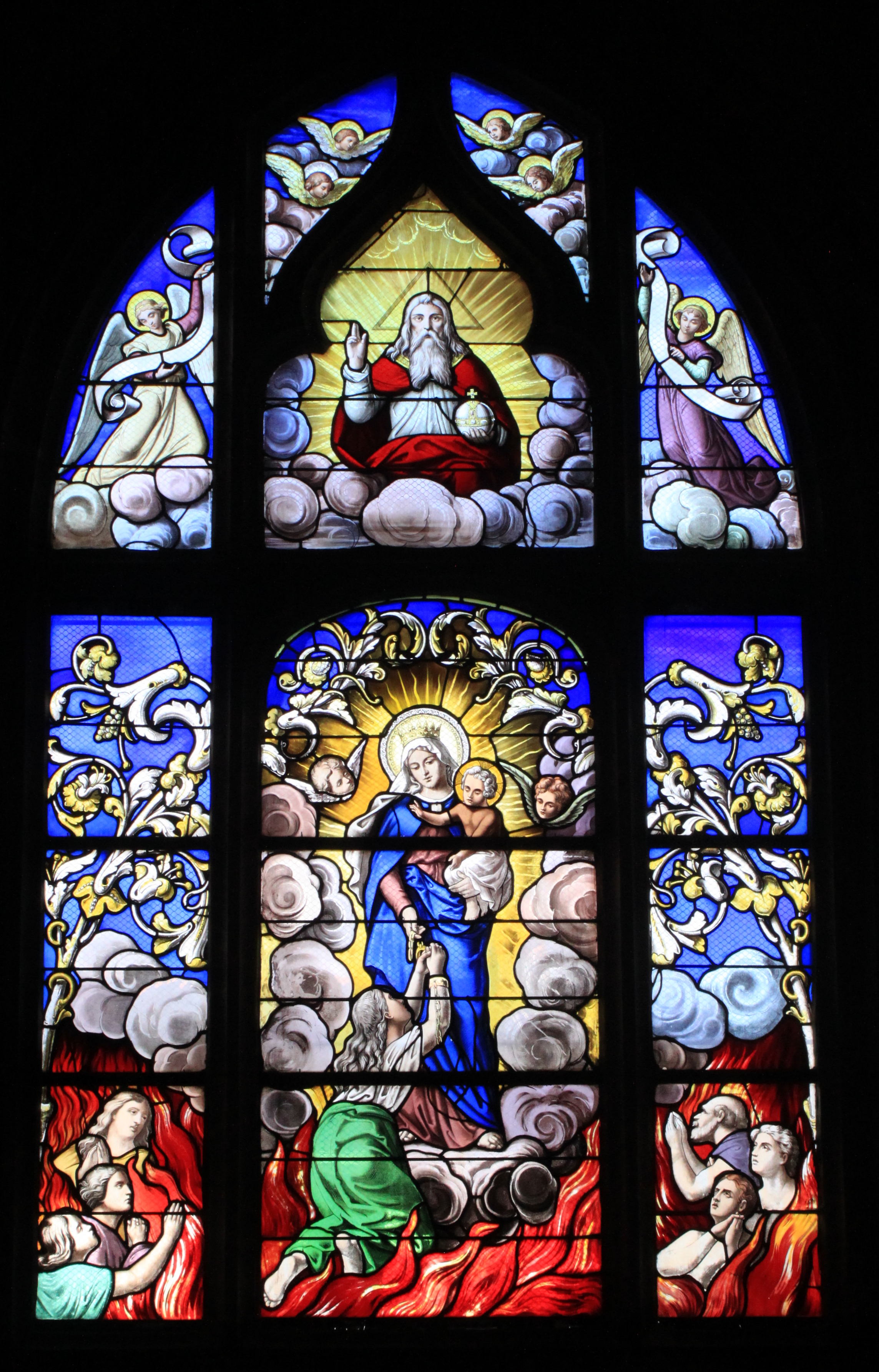 Vitrail, église Saint-Guénolé, Fr-44-Batz-sur-Mer.